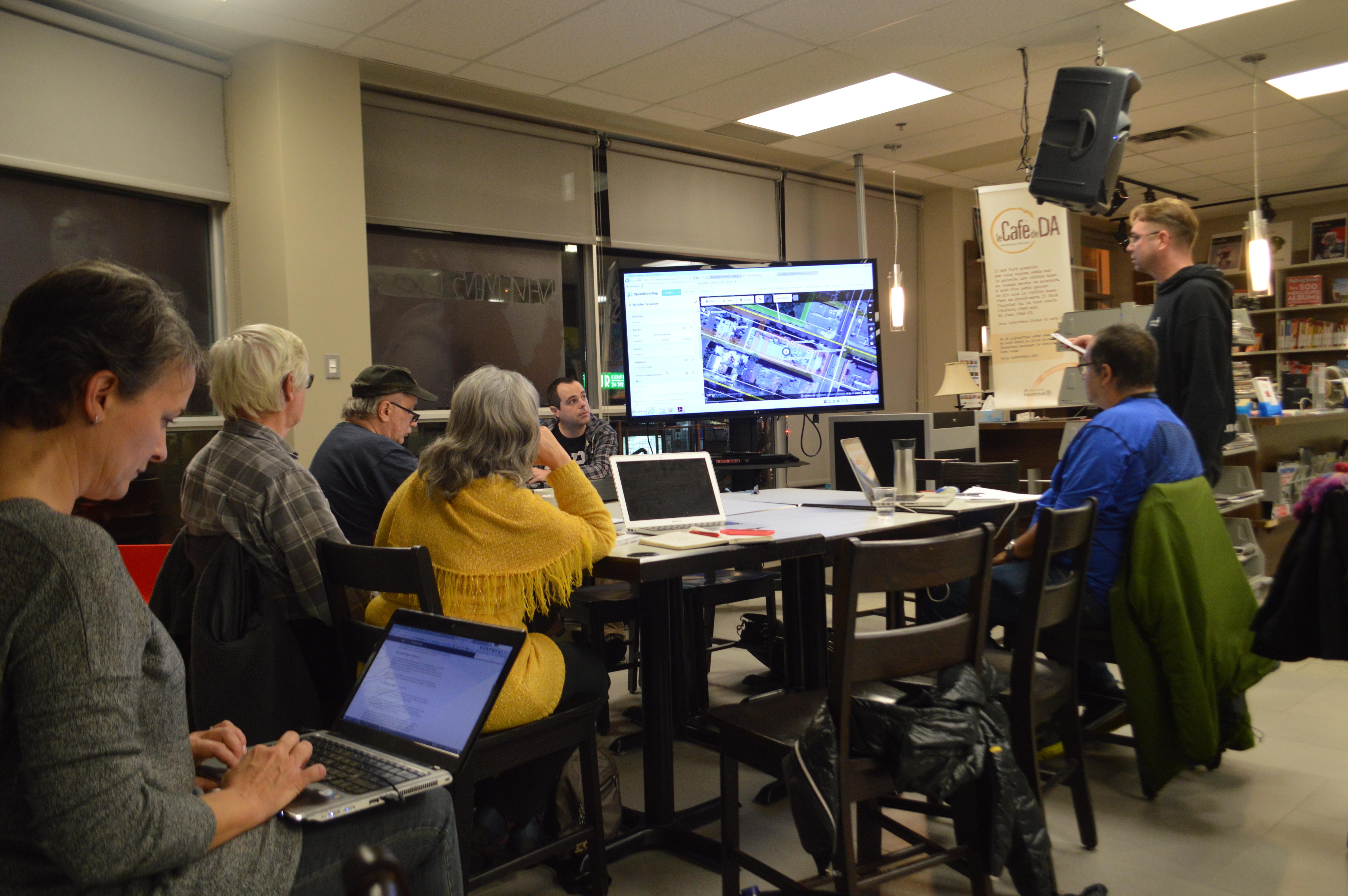 Café des savoirs libres au Café de Da de la bibliothèque d'Ahuntsic à Montréal. Atelier offert par Wikimédia Canada|Wikimédia Canada et OpenStreetMap Montréal.